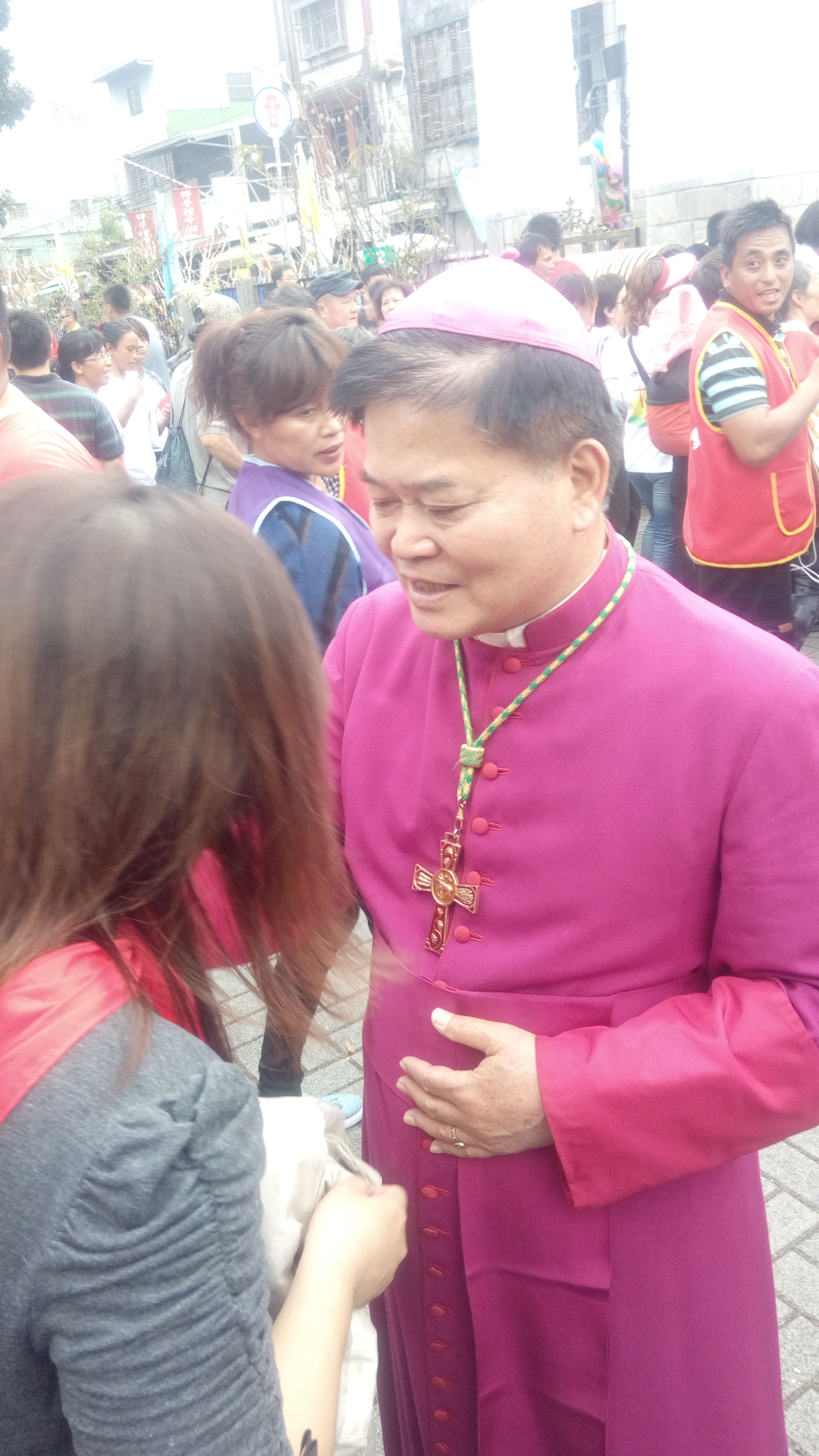 2015年,劉振忠總主教於萬金聖母宗座聖殿堂慶